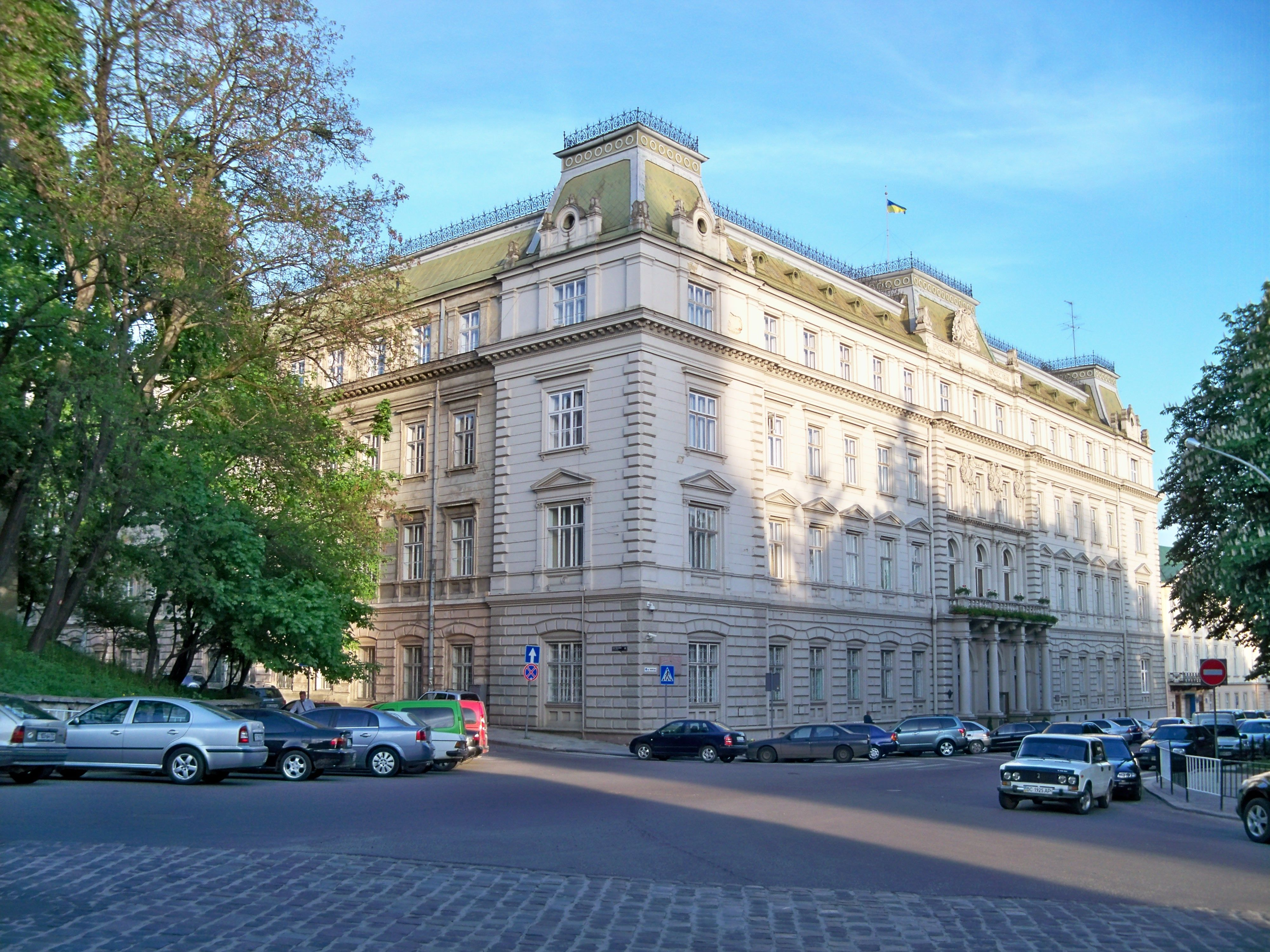 адміністративний будинок, Львів, Винниченка вул., 18